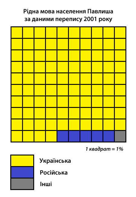 Інфографіка розподілу населення смт Павлиш Онуфріївського району за рідною мовою згідно з даними перепису 2001 року. Джерело: Розподіл населення Кіровоградської області за рідною мовою (у % до загальної чисельності населення) за переписом 2001 року